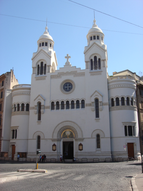 Chiesa valdese in piazza Cavour, a Roma, nel rione Borgo.